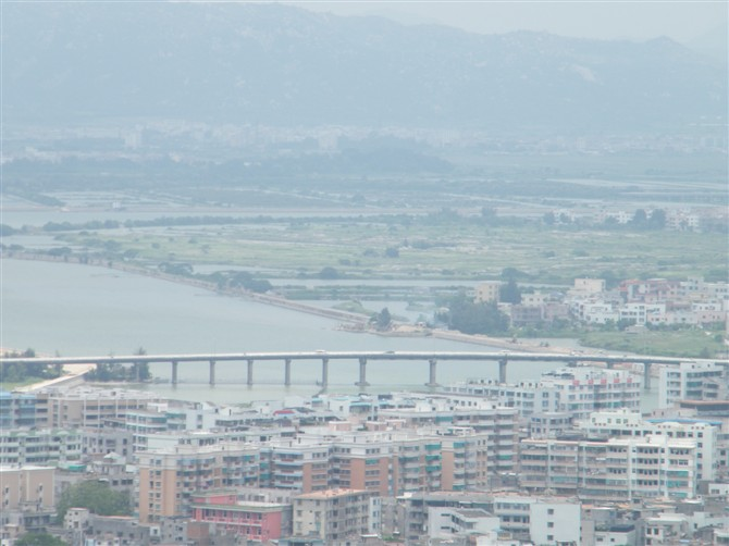 在山顶望 濠江大桥